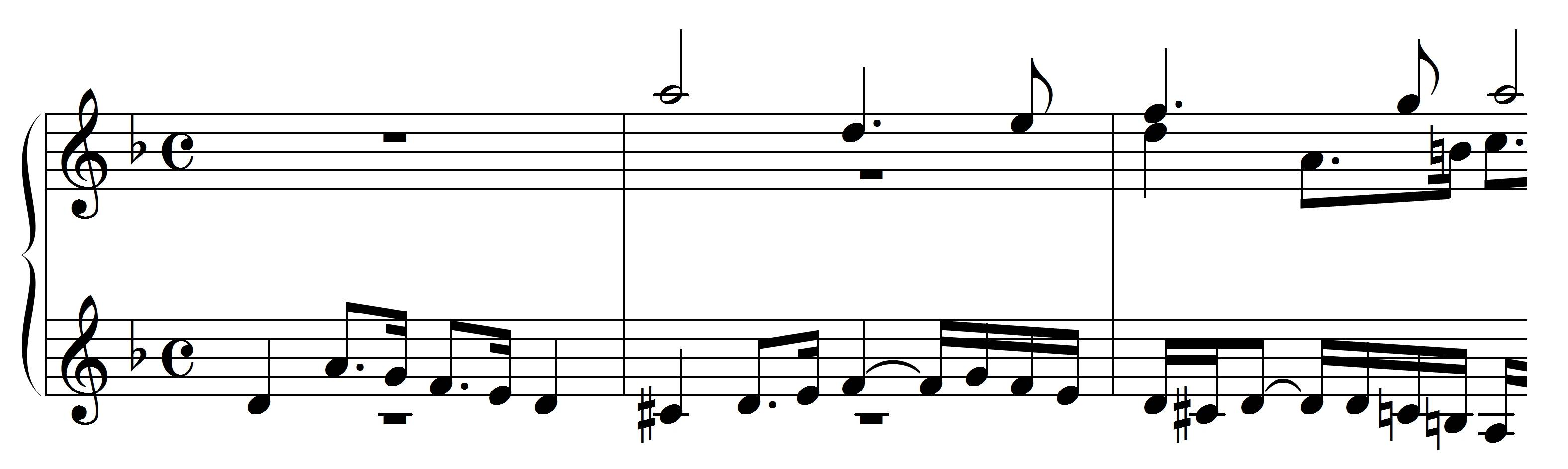 Bach, JS, Incipit Contrapunctus 7, BWV 1080